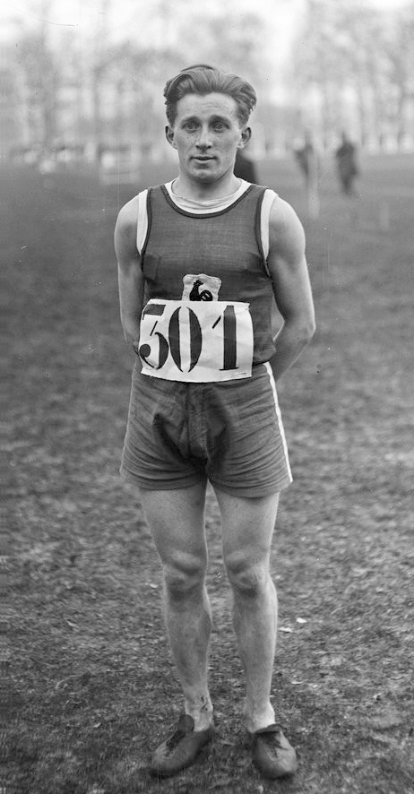 [27/2/21, St Cloud, Lucien] Duquesne, champion de France militaire de cross : [photographie de presse] / [Agence Rol]